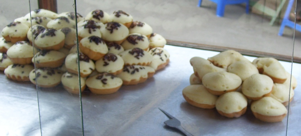 Kue cubit